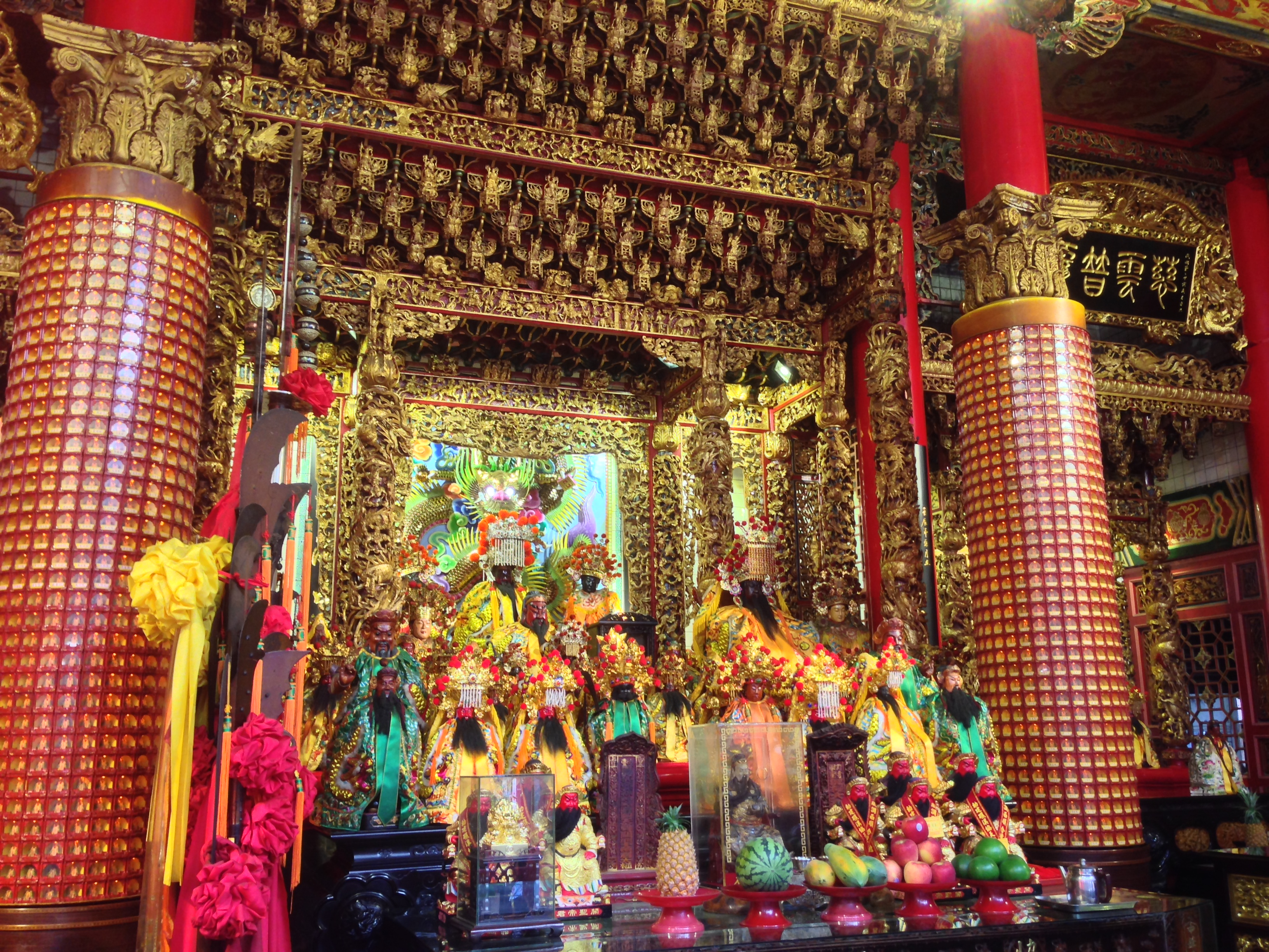 中文（台灣）: 礁溪協天廟神像